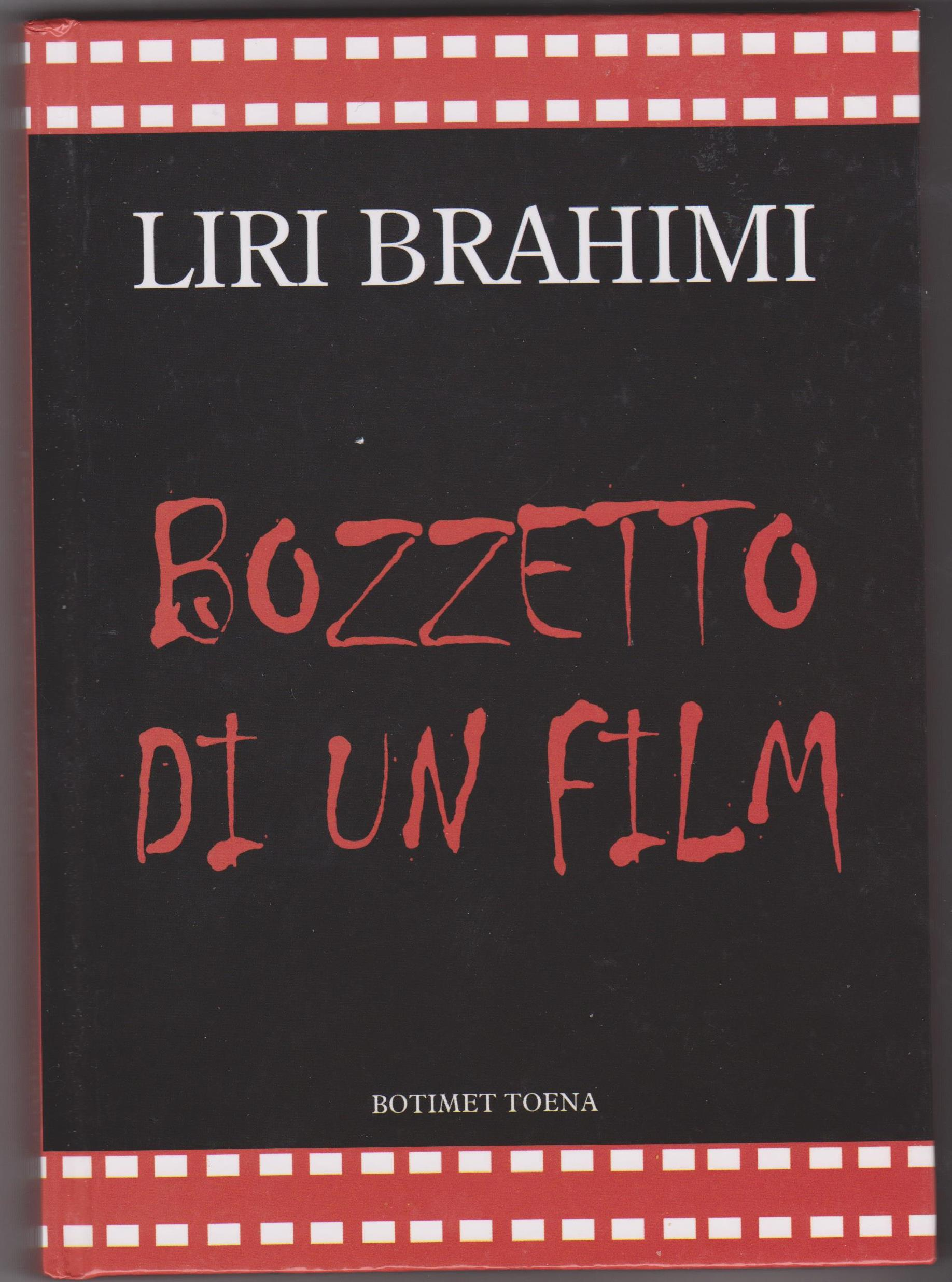 Libër i autores Liri Brahimi